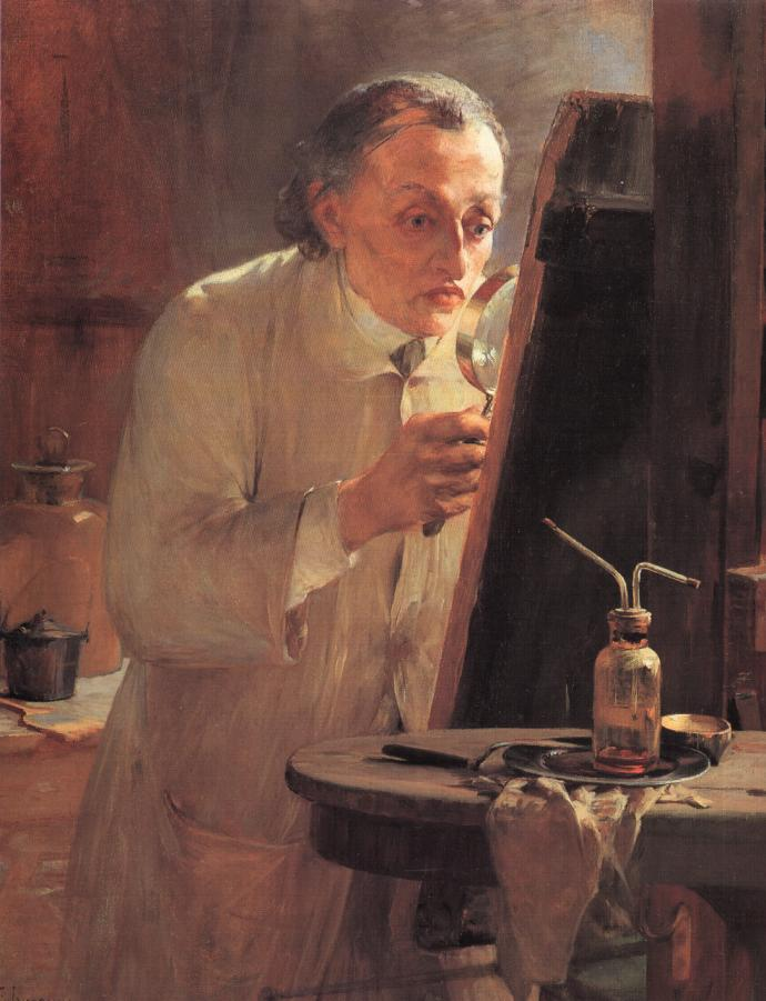 Πορτρέτο του ζωγράφου Γεώργιου Χατζόπουλου από το Γεώργιο Ιακωβίδη